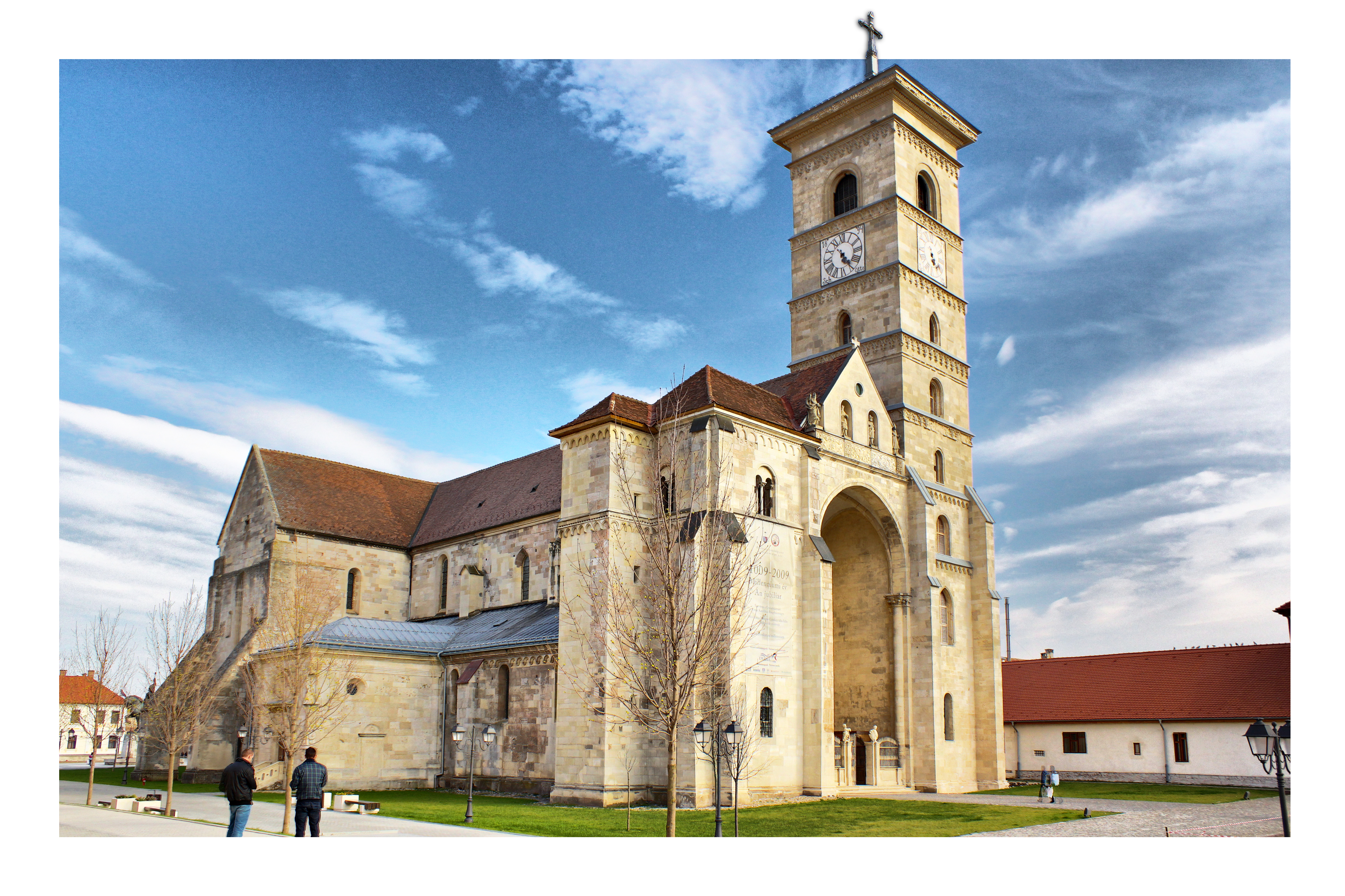 Catedrala Romano-Catolică, Alba Iulia, România